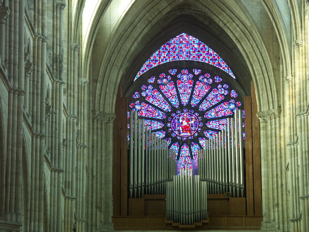 Cathédrale Saint-Gervais-et-Saint-Protais de Soissons, France - Rose window